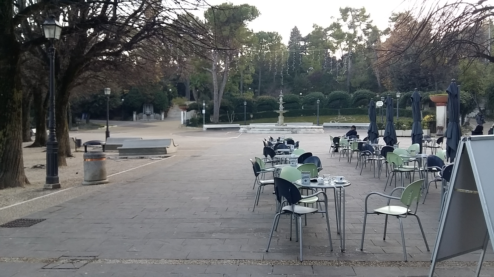 L'immagine mostra Piazza Mazzini con la caratteristica fontana, entrata della Villa Comunale di Chieti